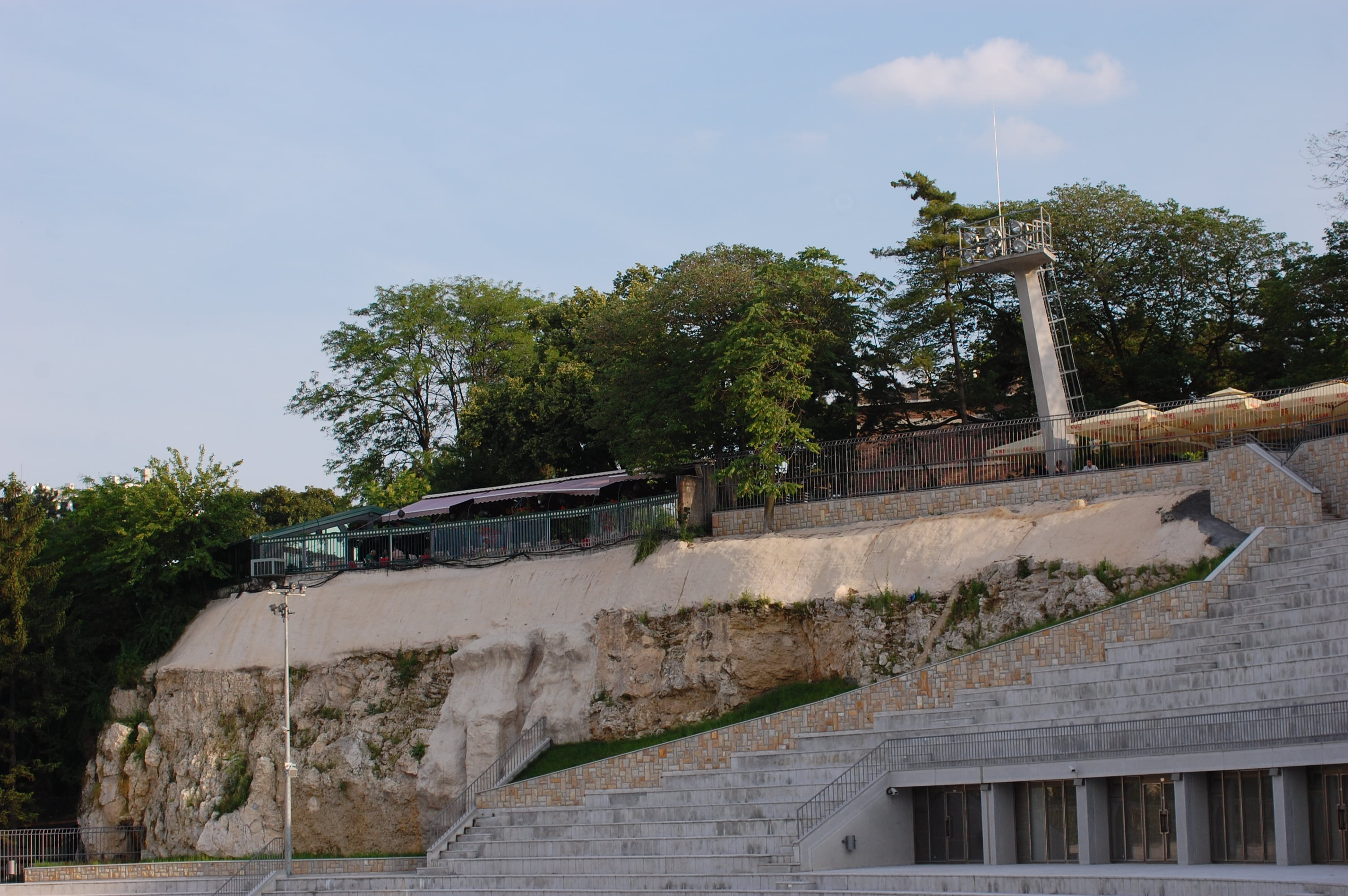 Srpski (latinica): Ово је фотографија заштићеног природног добра у Србији под шифром: СП020 This is a a photo of a natural area in Serbia with ID: СП020 Природни споменик Миоценски спруд Ташмајдан